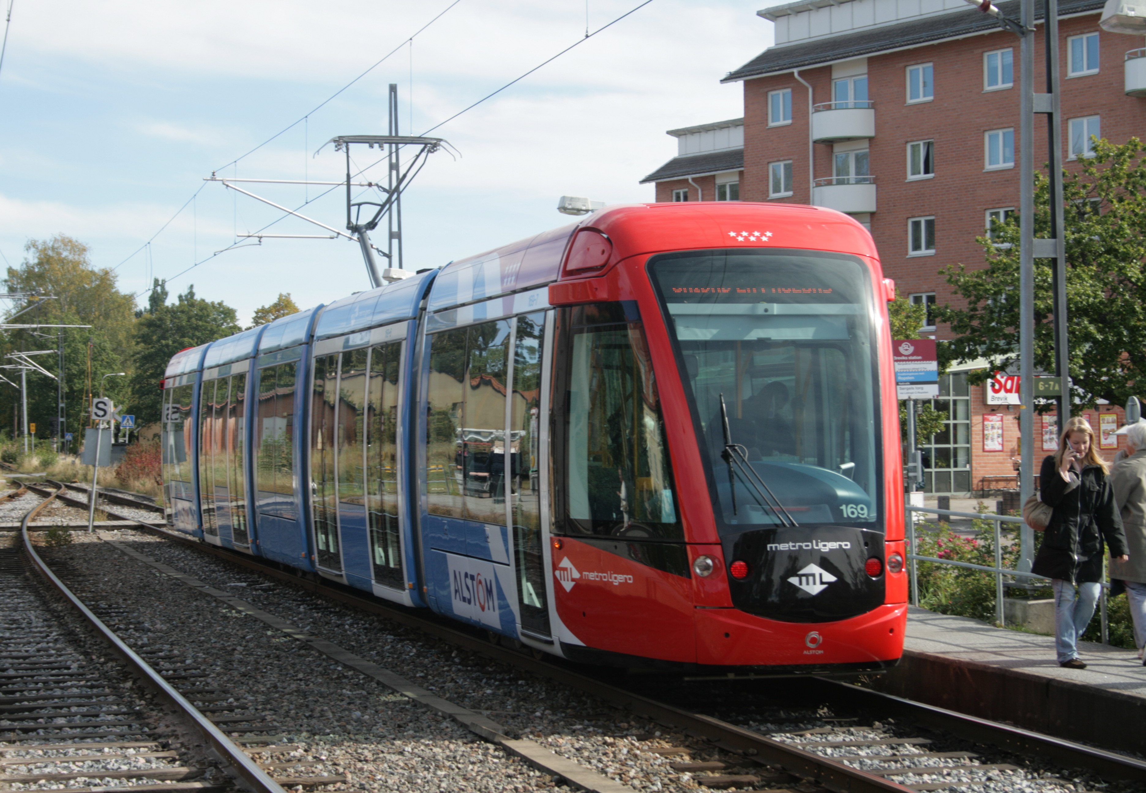 Alstom Citadis TGA 302 in Brevik, Lidingö, Stockholm, Sweden